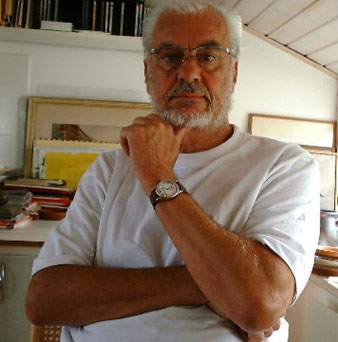 Torsten Erasmie